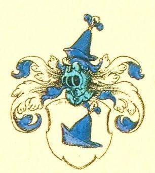 Wappen derer von Bodungen; Thüringer Uradel